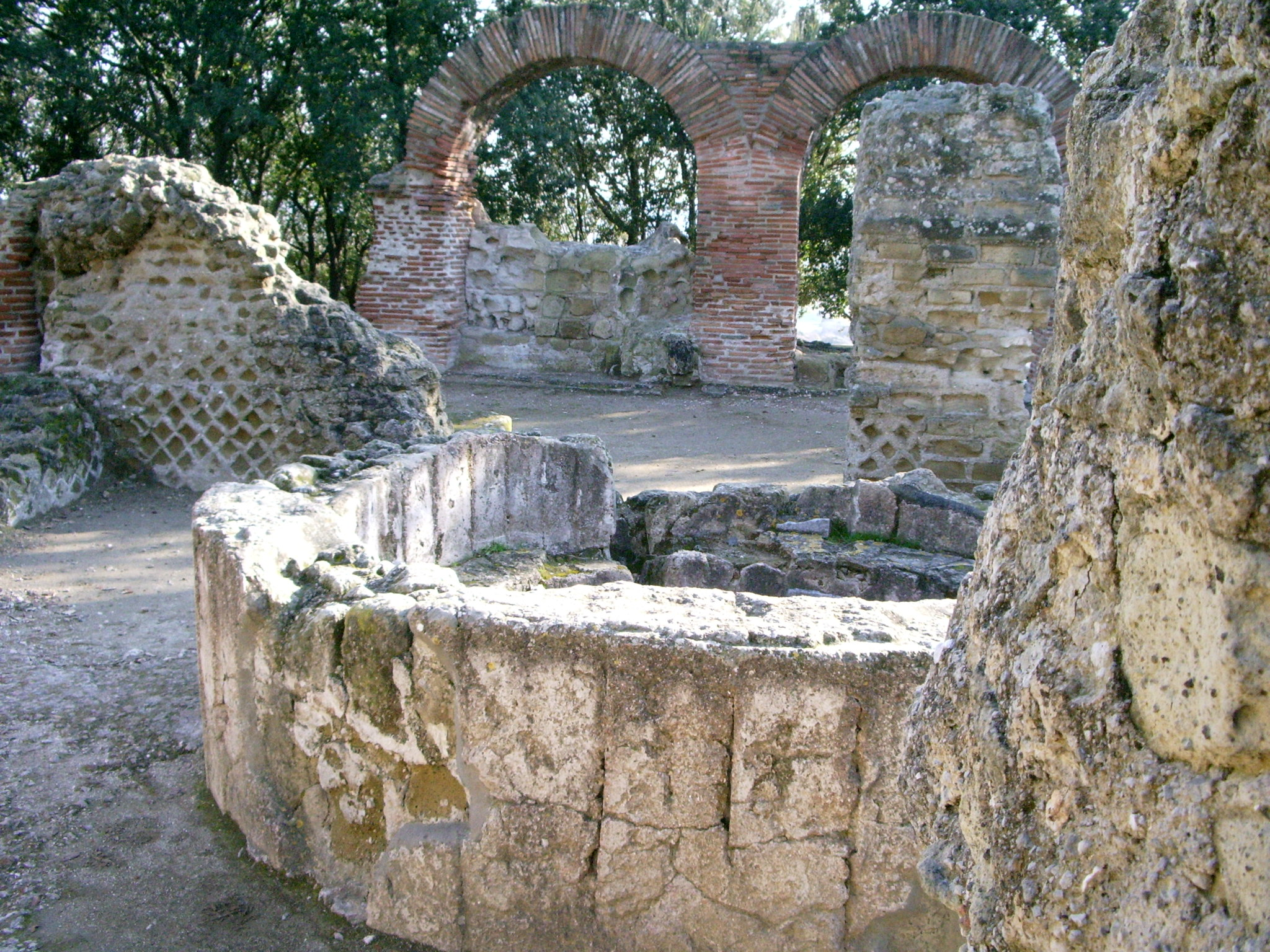 Ce baptistère chrétien se trouve à l'intérieur du temple de Zeus à Cumes. Les chrétiens ont transformé ce temple grec situé au sommet de l'acropole en basilique paléochrétienne. Photographie personnelle donc pas de protection juridique nécessaire signé bobbylamouche.